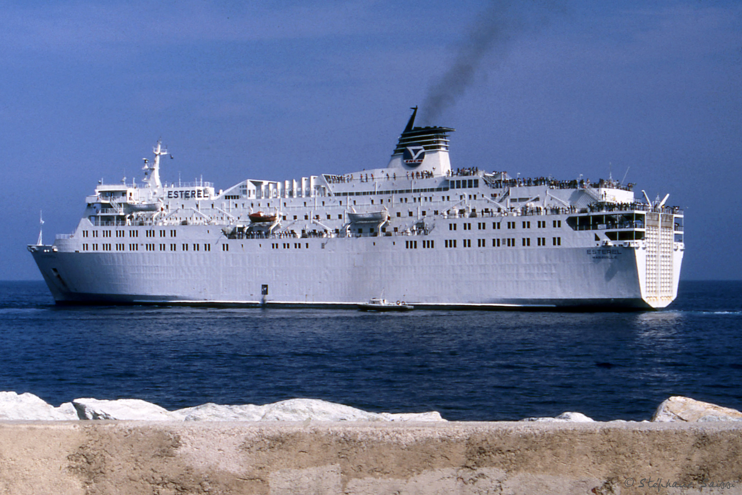 L'Estérel de la SNCM quittant le port de Bastia en 1987.